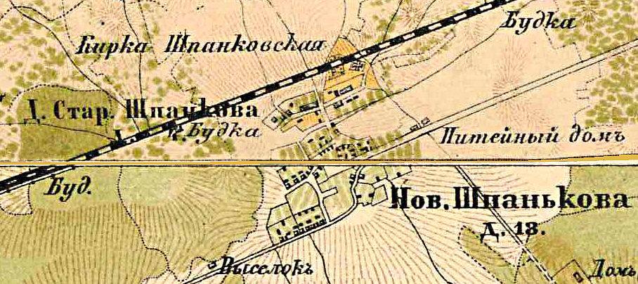 Деревня Шпаньково на карте 1885 года.